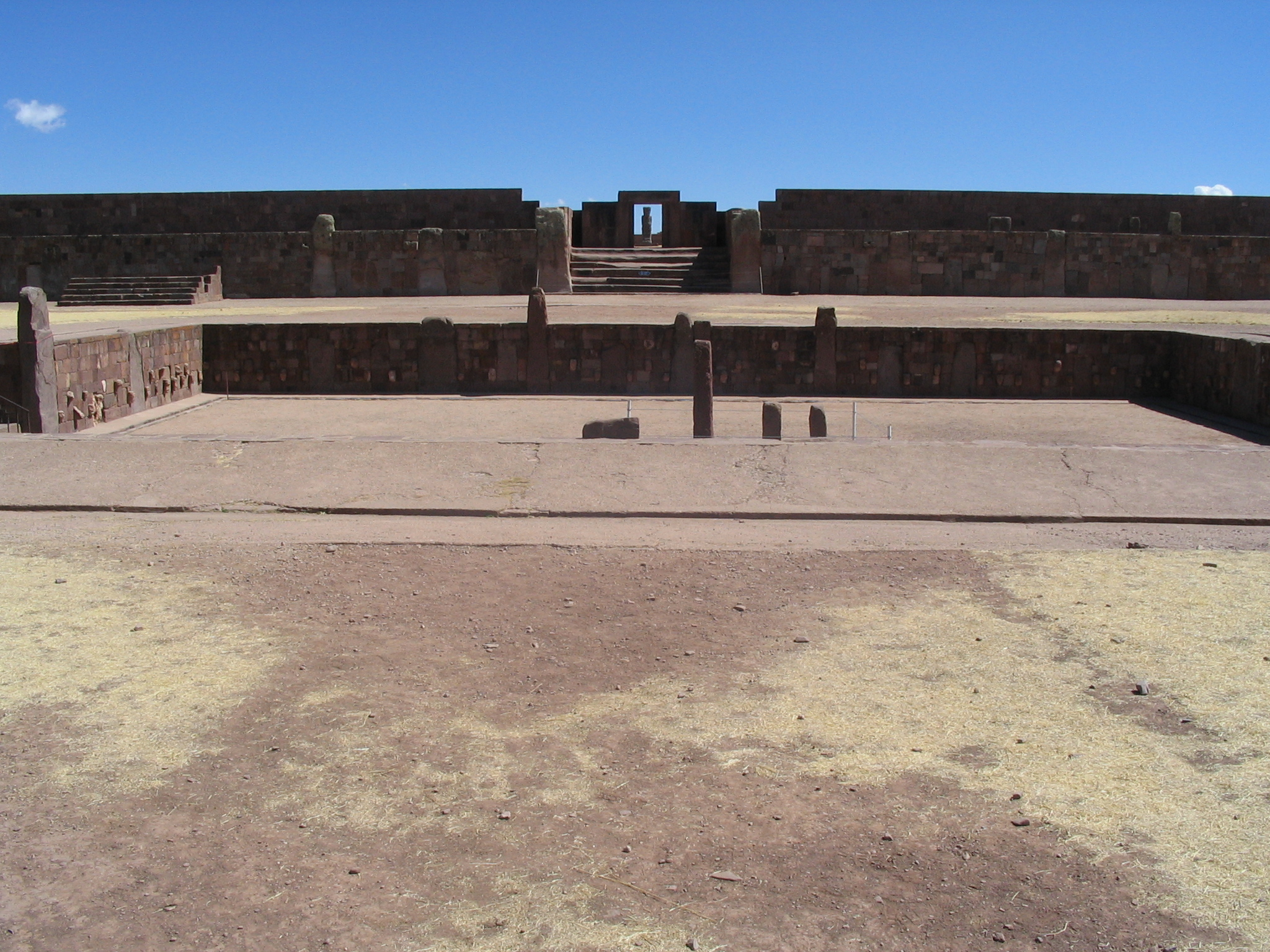 Photo du temple "Kalasasay" prise de face avec à l'avant plan, le temple "Semisubterraneo". Photo prise par User:Anakin en 2005.